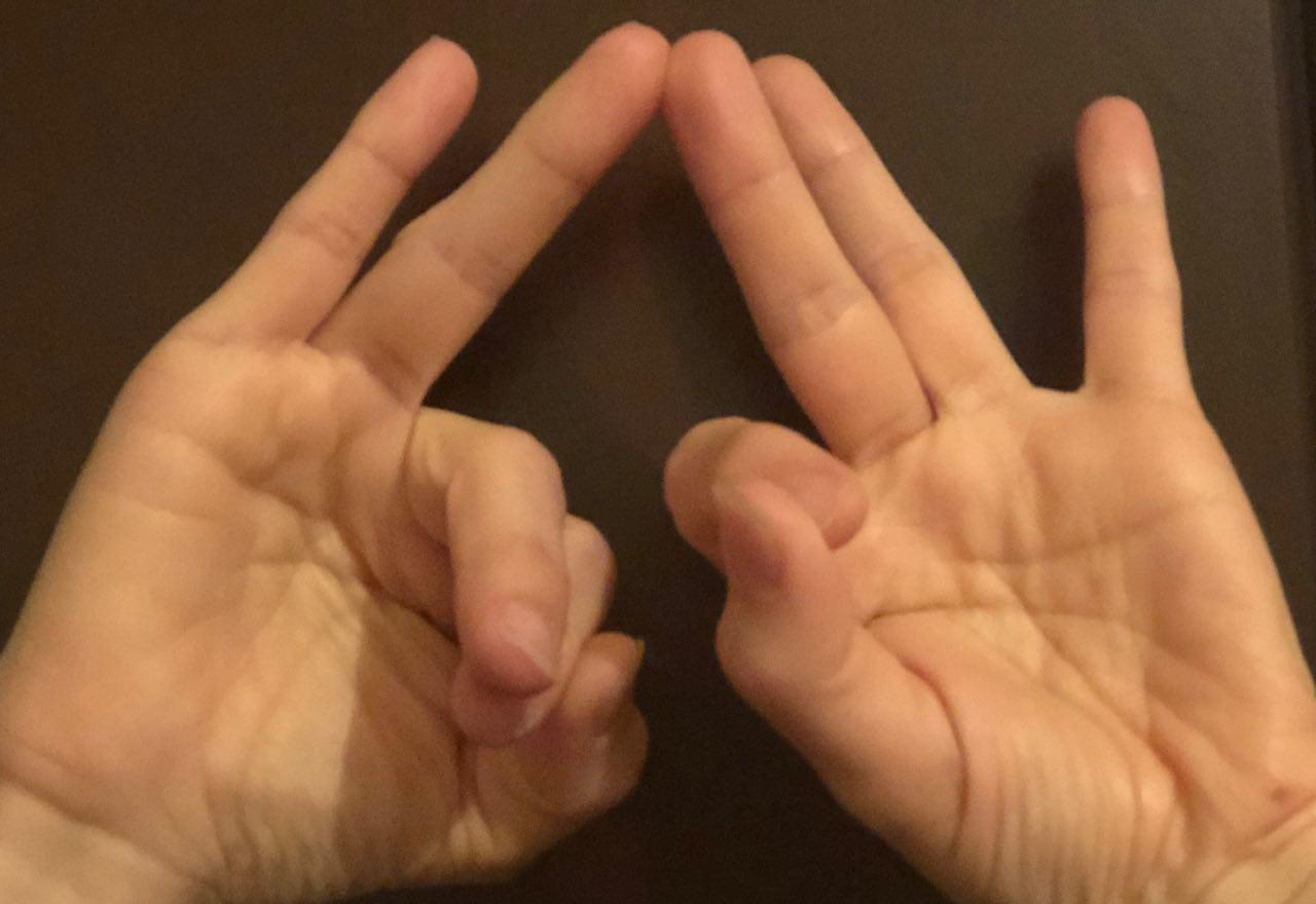 ضرب 13 در 14با انگشتان